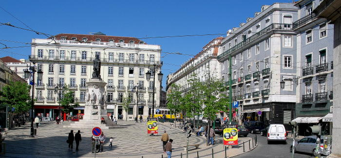 Largo Camoes in Chiado district